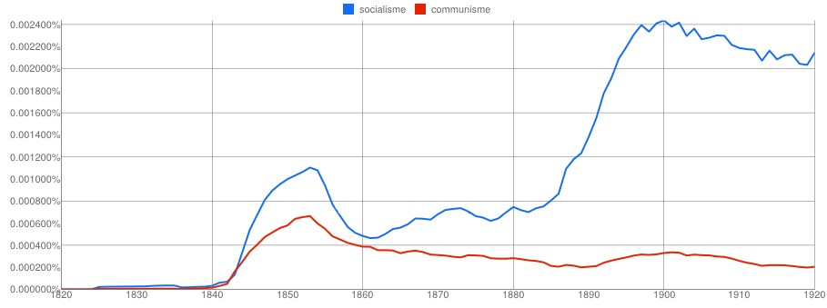 Evolution des emplois des termes « socialisme » et « communisme » dans la base de donnée de Google Books sur la période 1820-1920. Les résultats ont été corrigés avec un « smoothing » de 6 pour pondérer les variations ponctuelles.